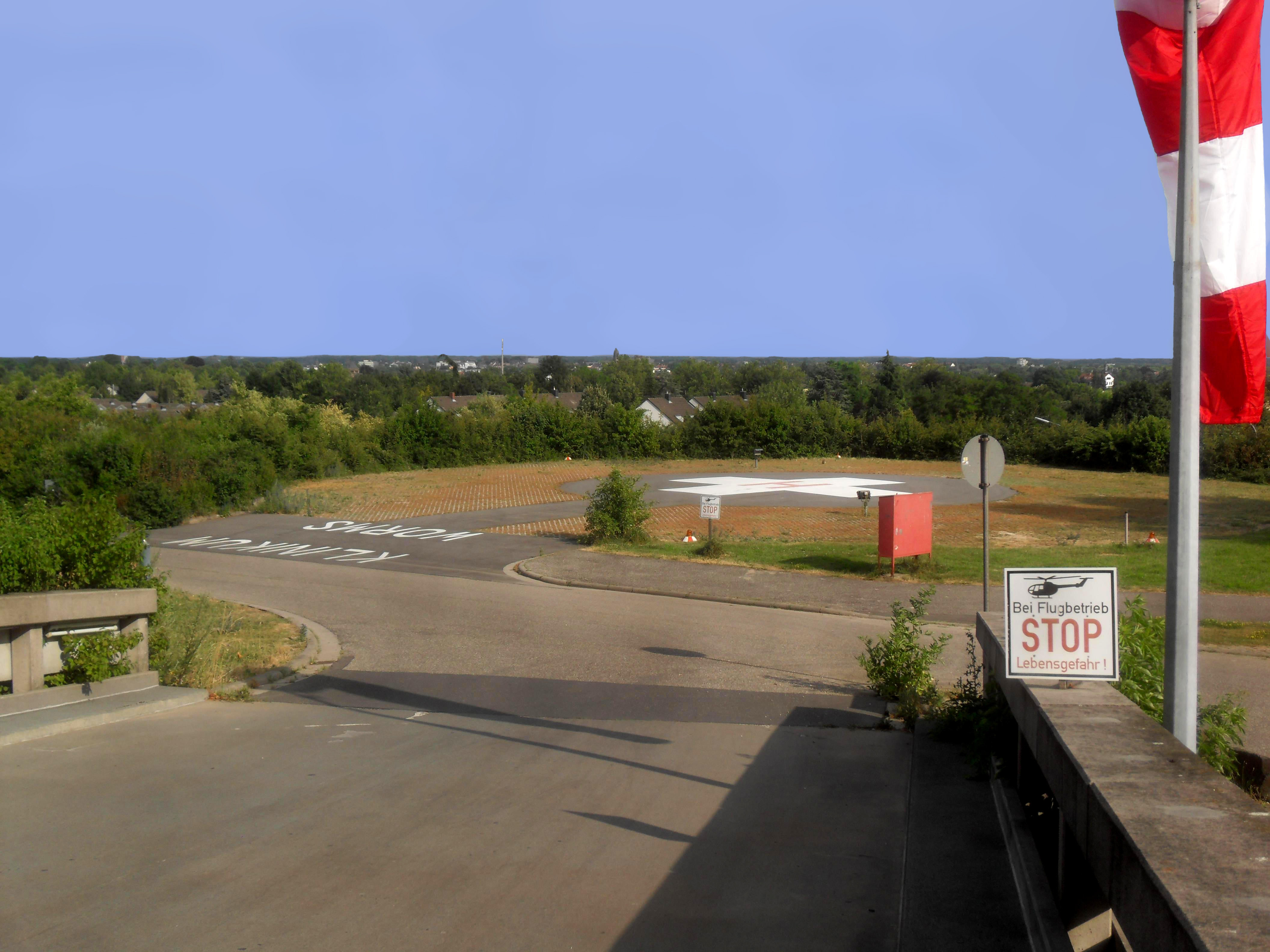 Der Hubschrauberlandeplatz des Klinikums Worms in Rheinhessen in Rheinland-Pfalz (Deutschland)